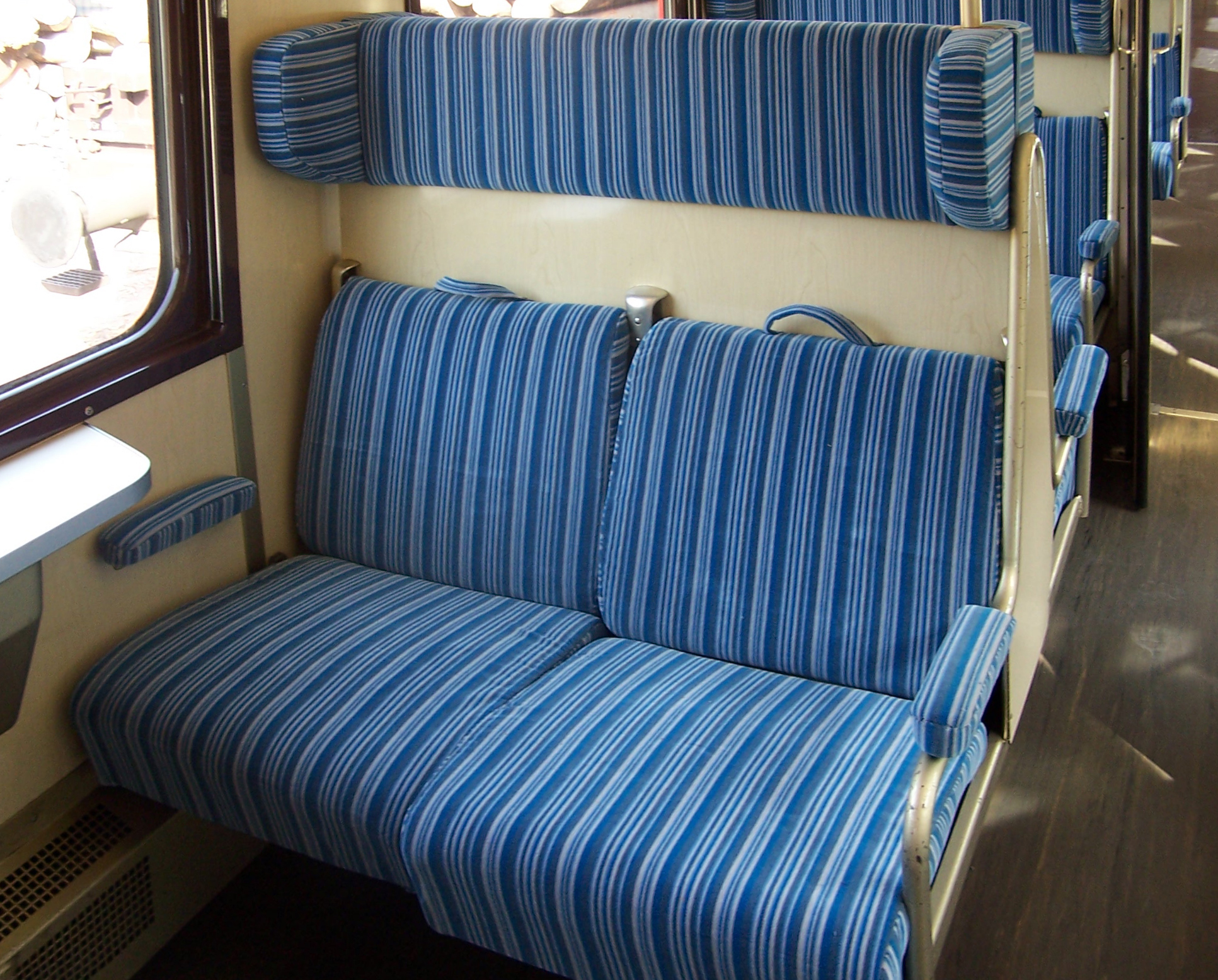 Blau/Weiße Sitzbezüge im BDp-l 84-33 039-9